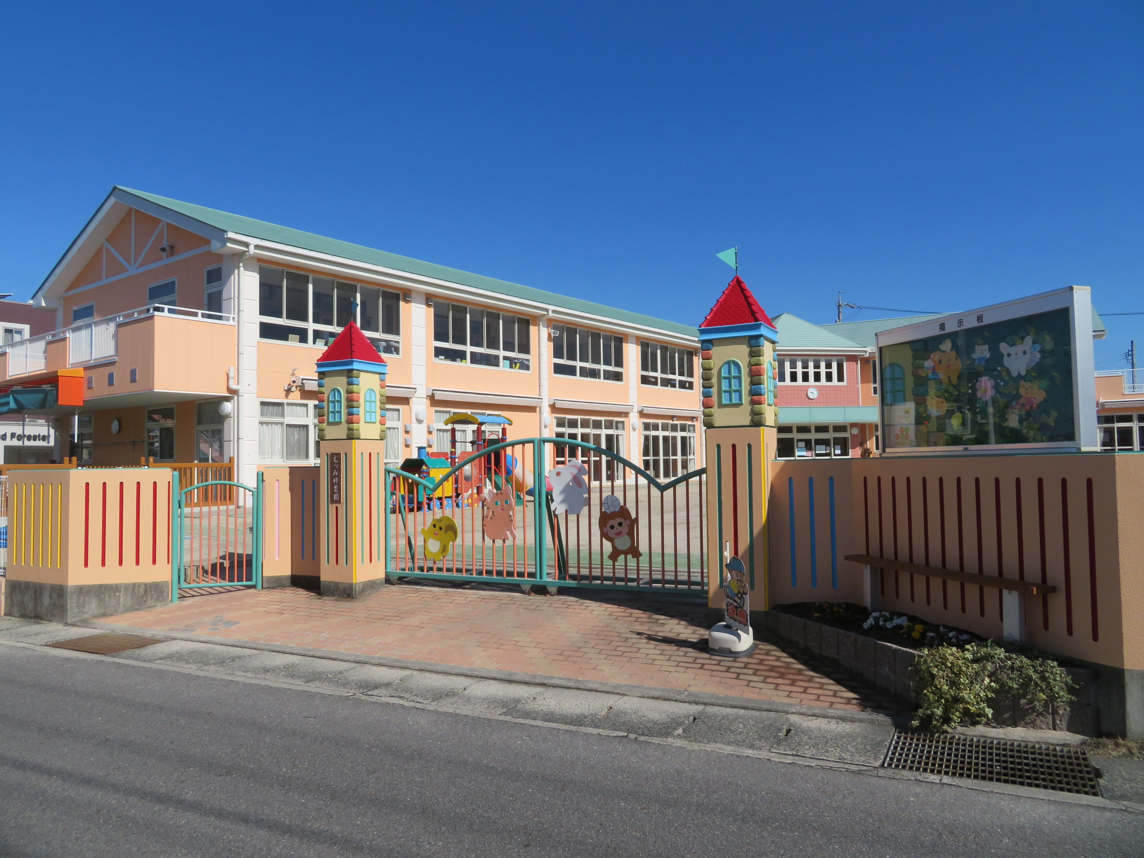 社会福祉法人むつみ会 むつみ保育園（岡崎市法性寺町）